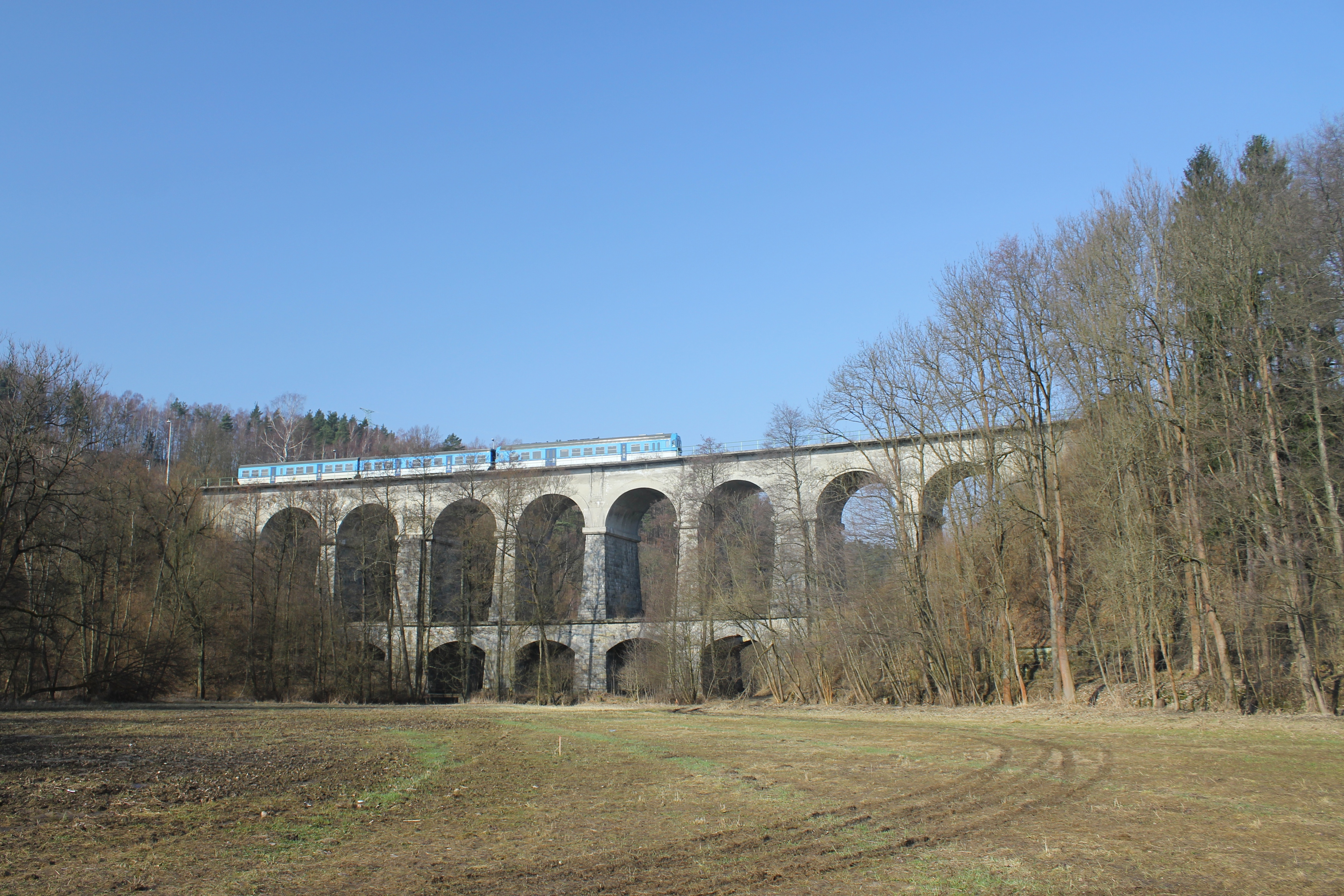 Sychrovský viadukt, Radimovice